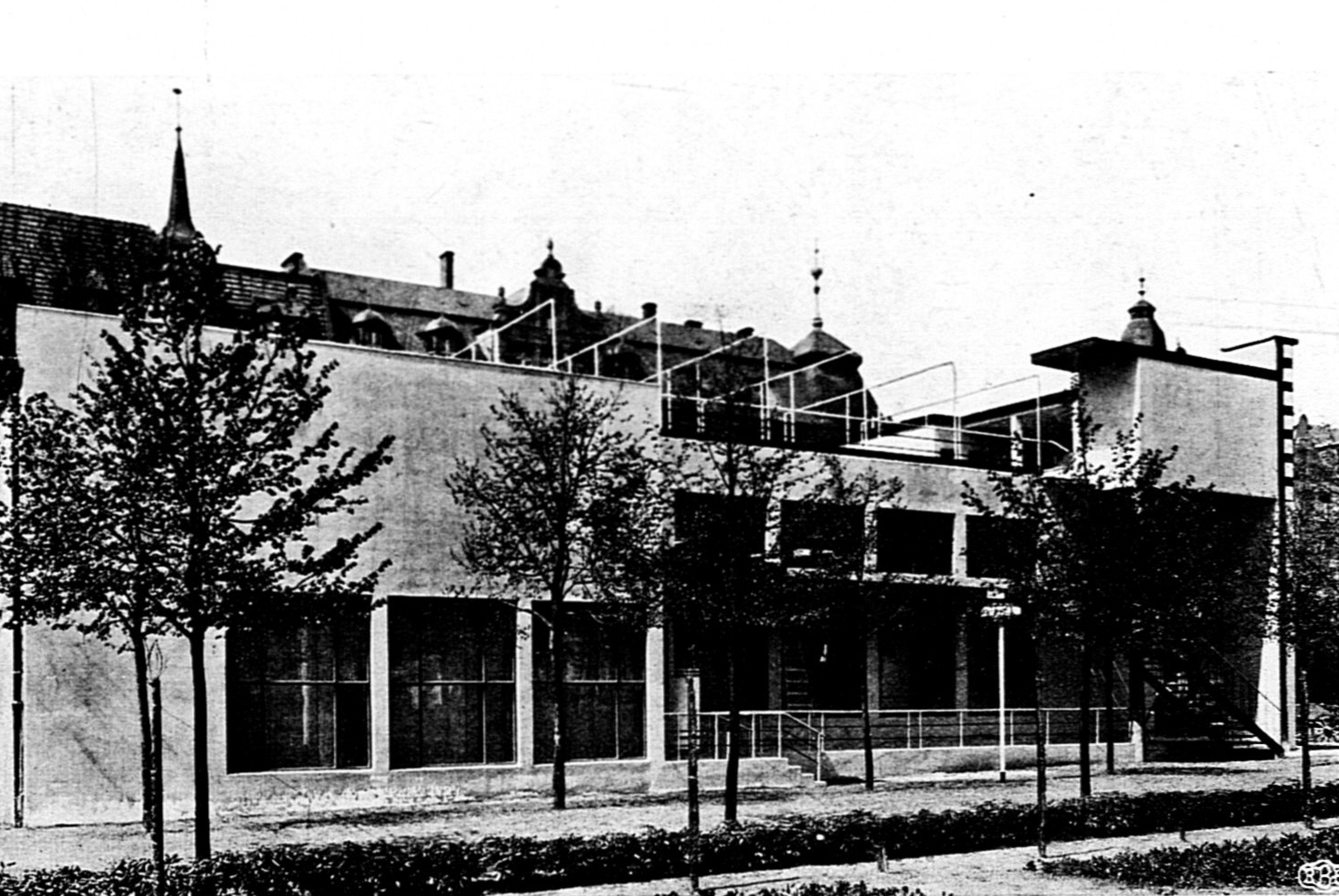 Anatolia Hryniewicka Piotrowska, Pawilon Pracy Kobiet na Powszechnej Wystawie Krajowej w Poznaniu (1929) w budowie